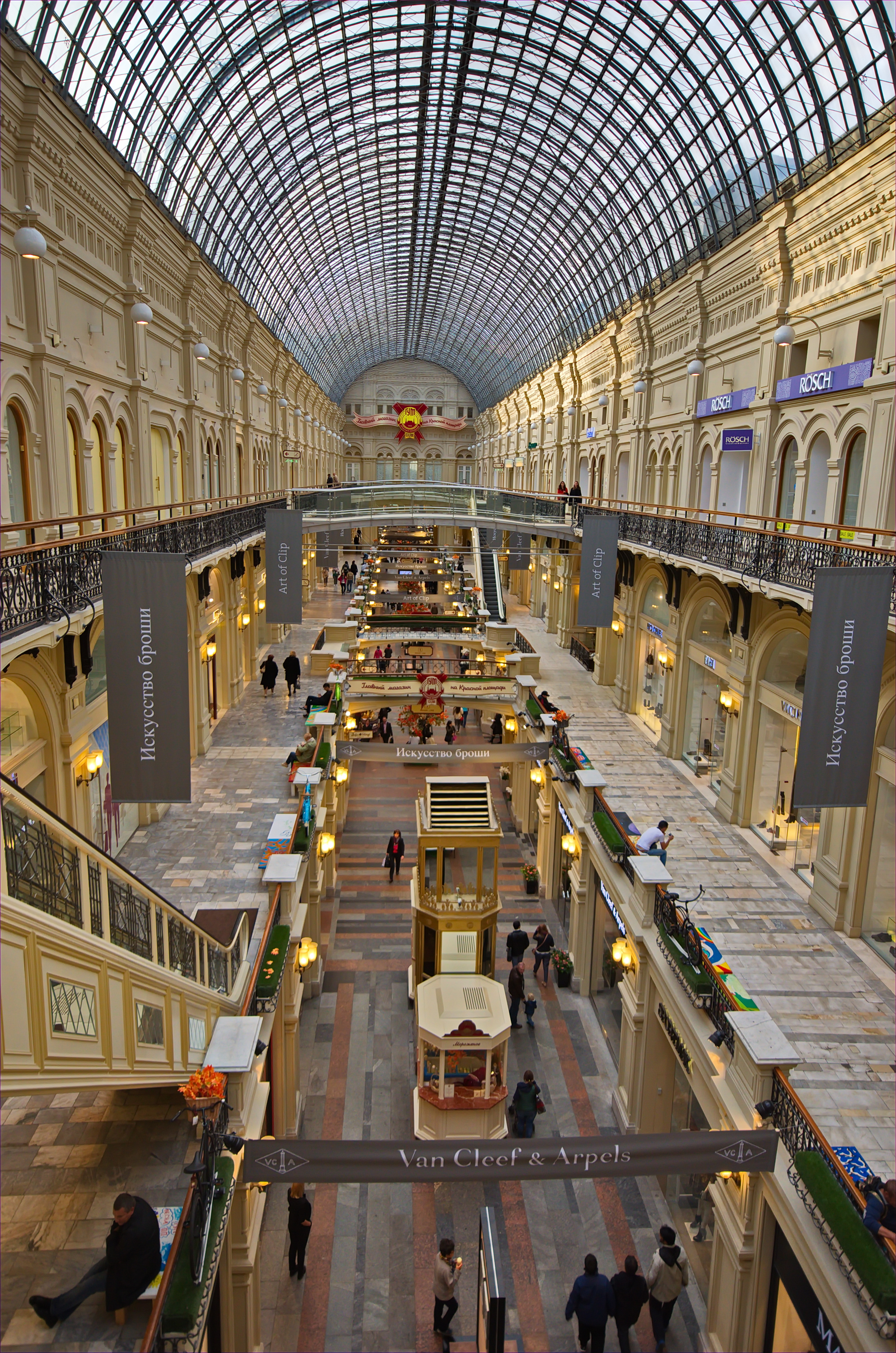 0284 - Moskau 2015 - Kaufhaus GUM